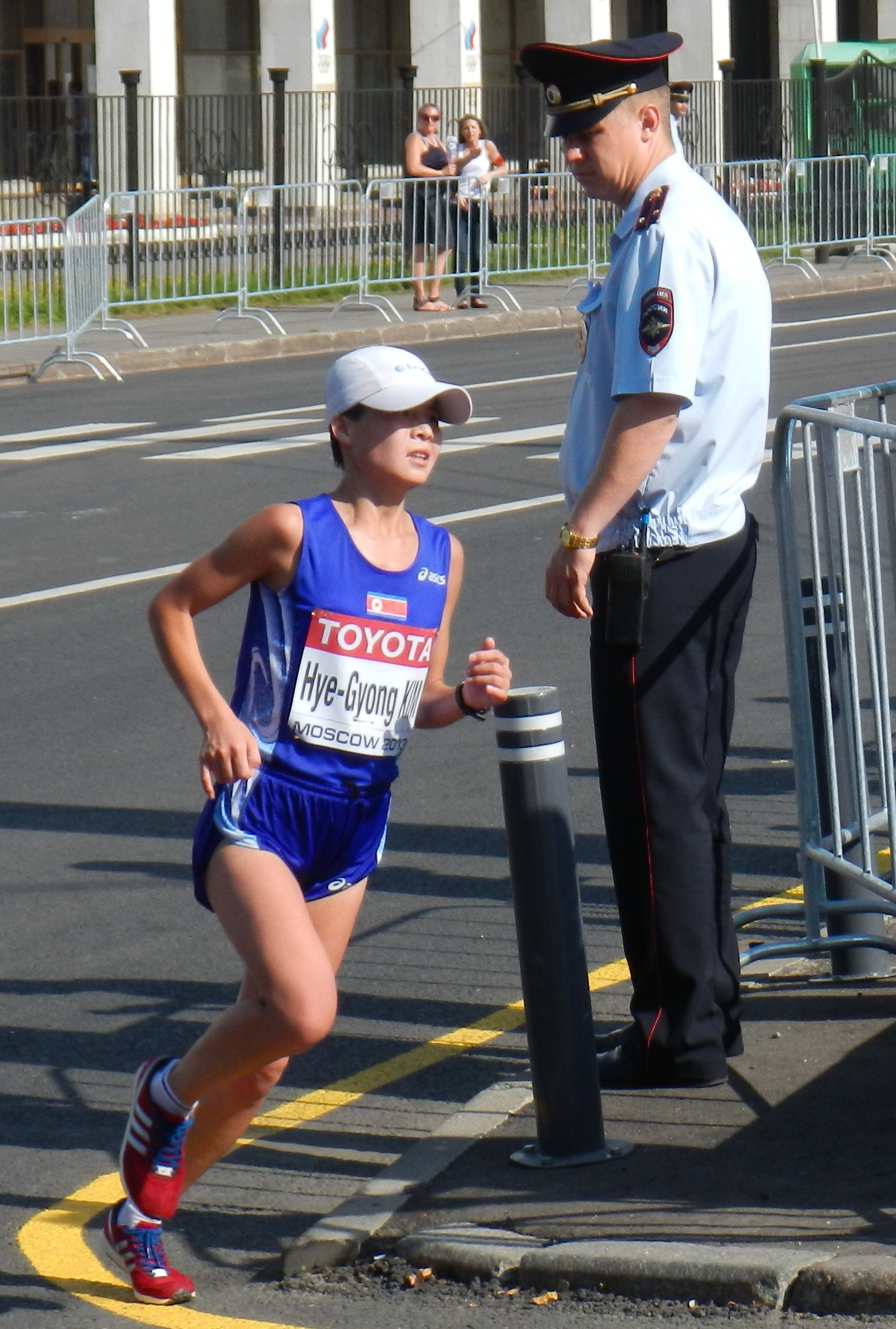 La marathonienne Kim Hye-Gyong lors de l'édition des Championnats du Monde de Moscou 2013.